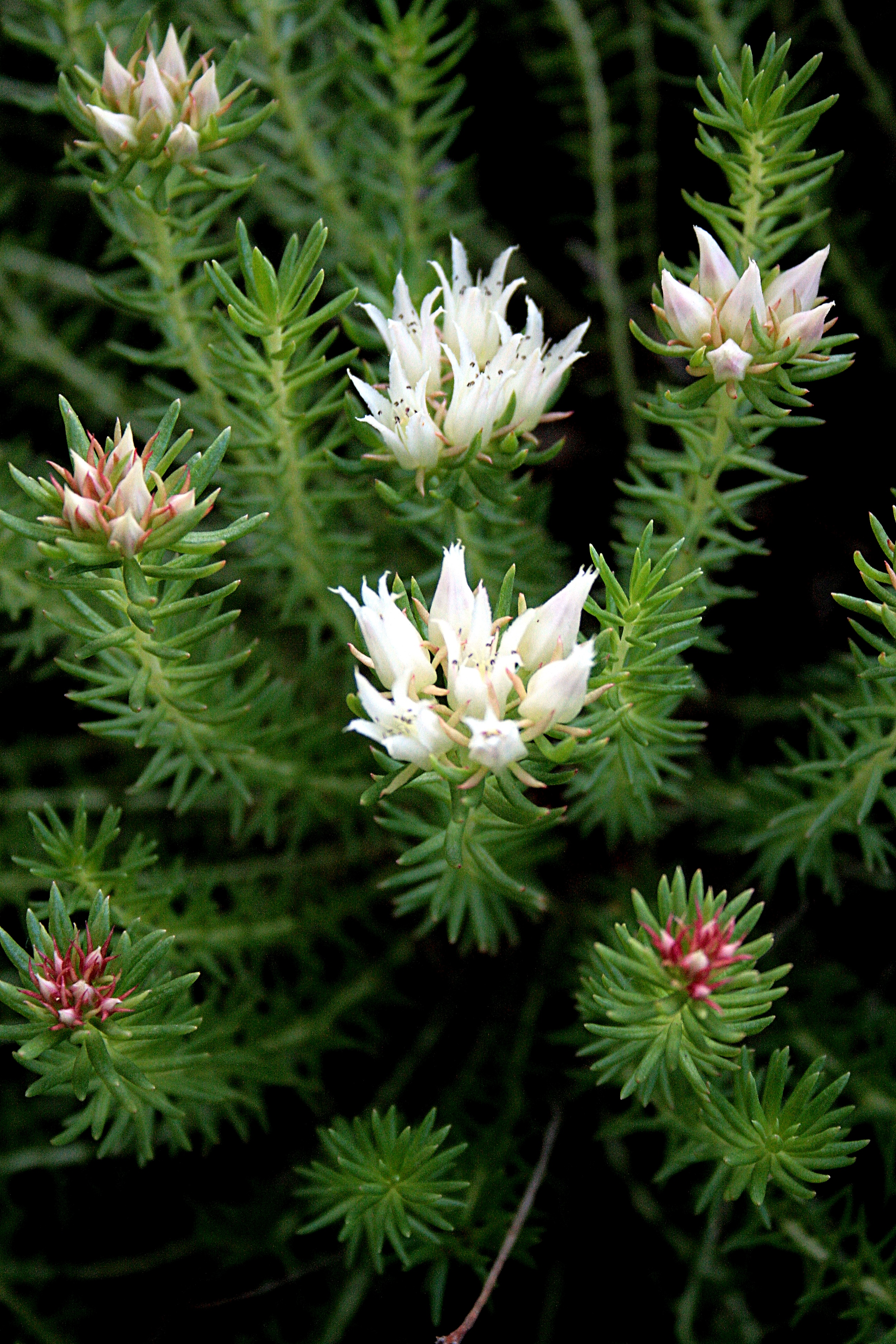 Ísland, Akureyri Botanical Gardens: Rhodiola_dumulosa (Referenzfoto)